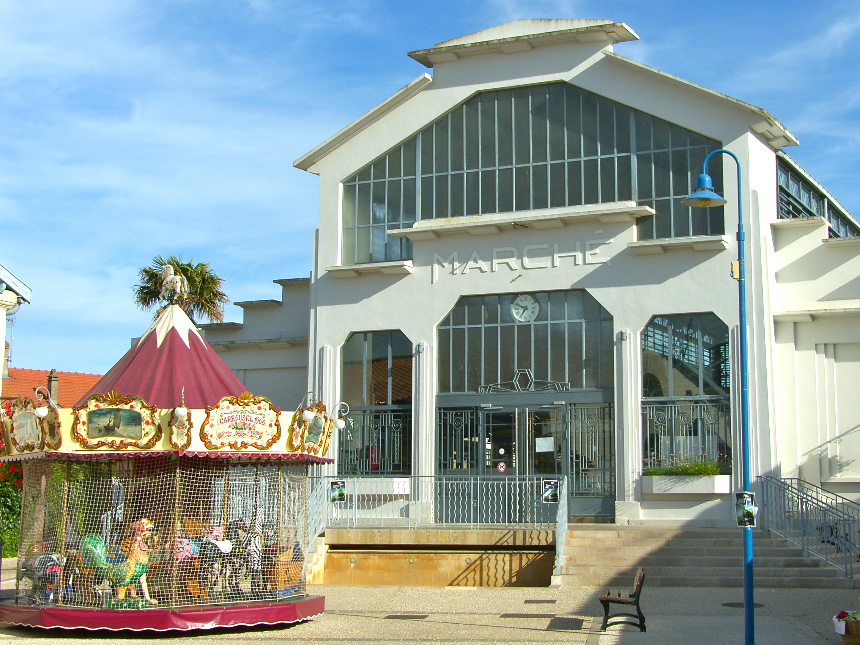 Halle du Marché de Fouras, place José Cando (France, Charente Maritime, 17450).